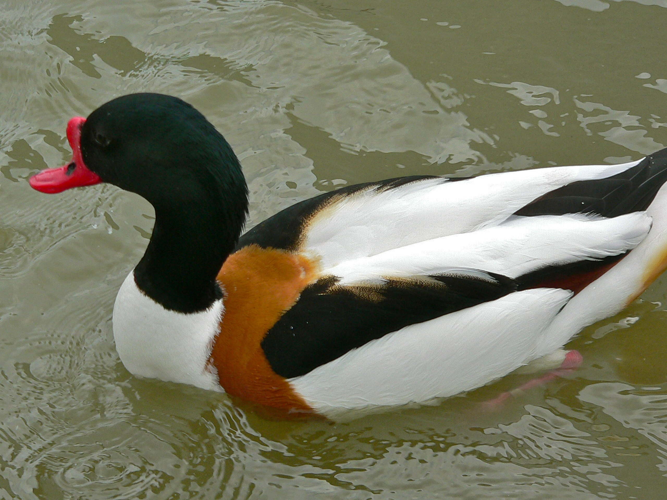 Parc Phoenix, Nice, Alpes-Maritimes, FRANCE